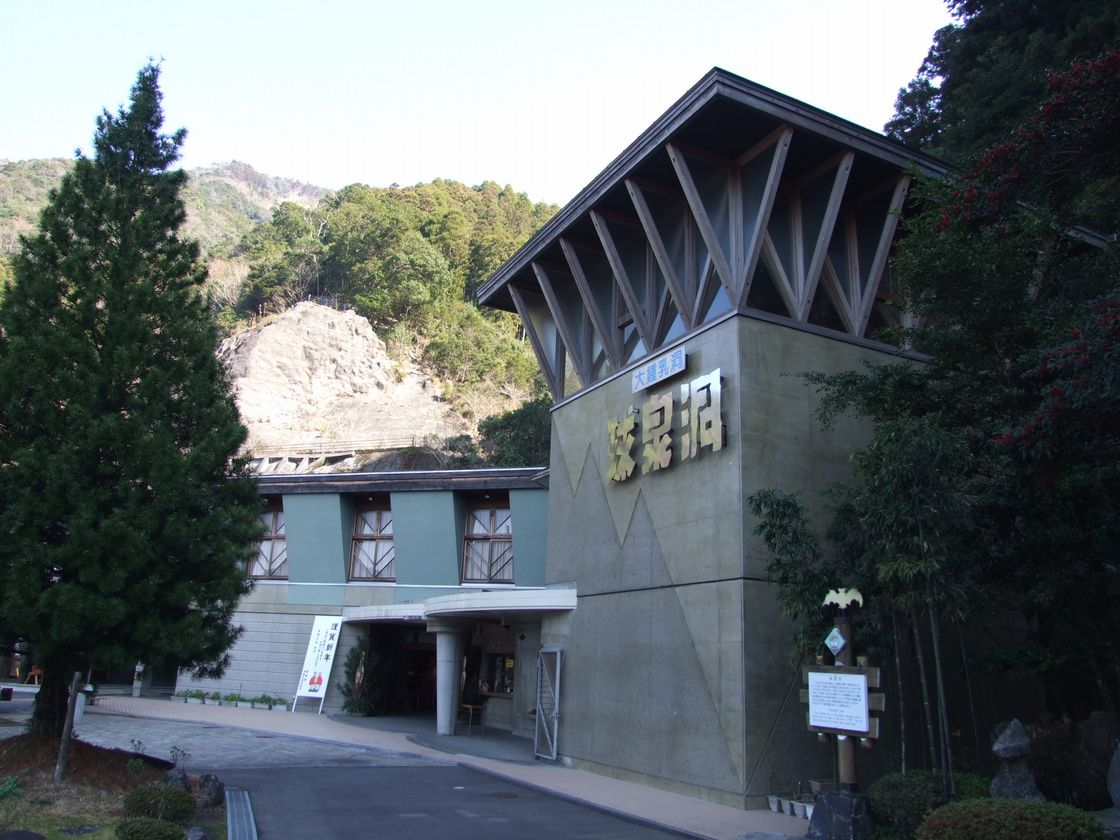 Kyusendo 球泉洞